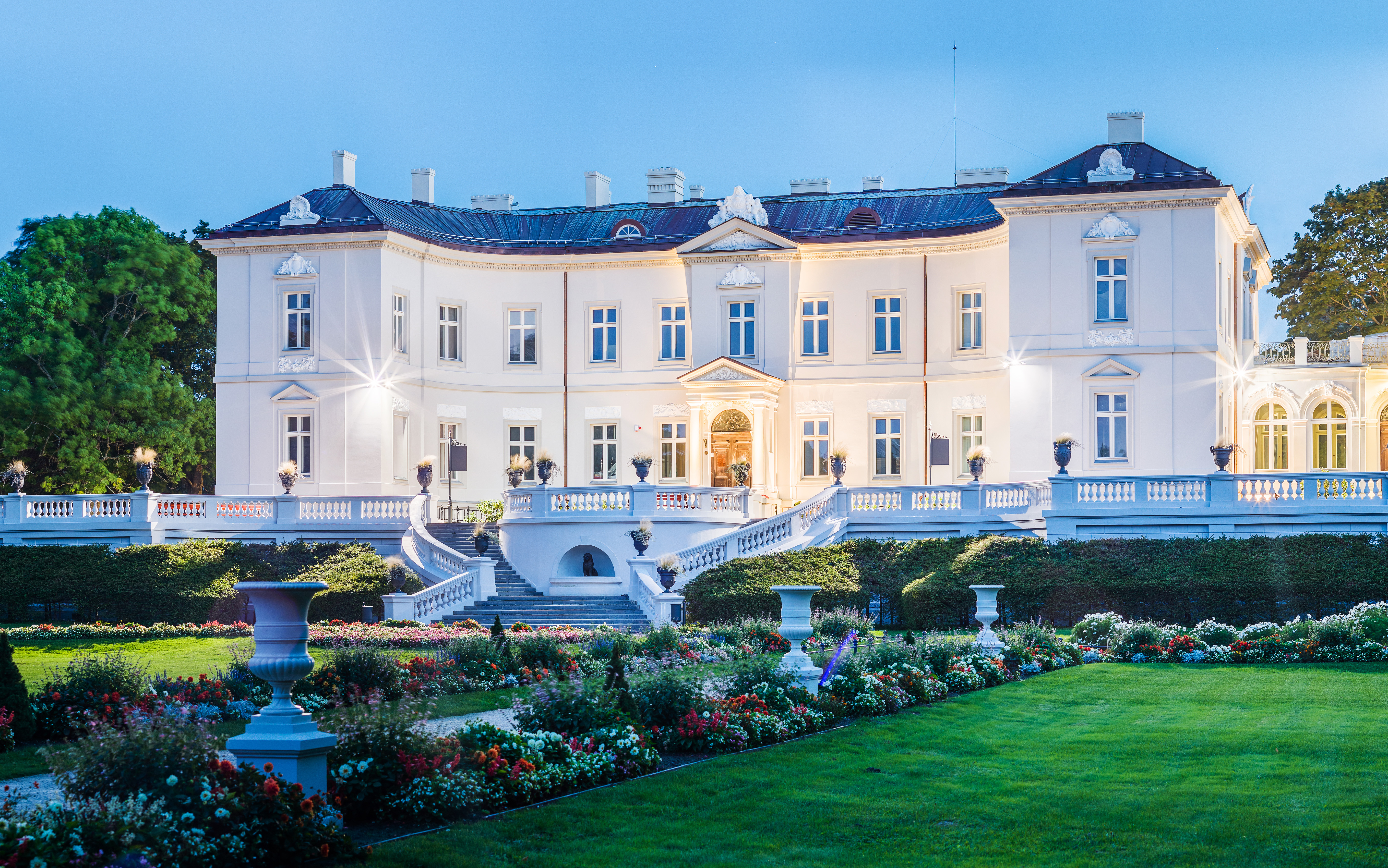 Tiškevičiai Palace at dusk, Palanga, Lithuania